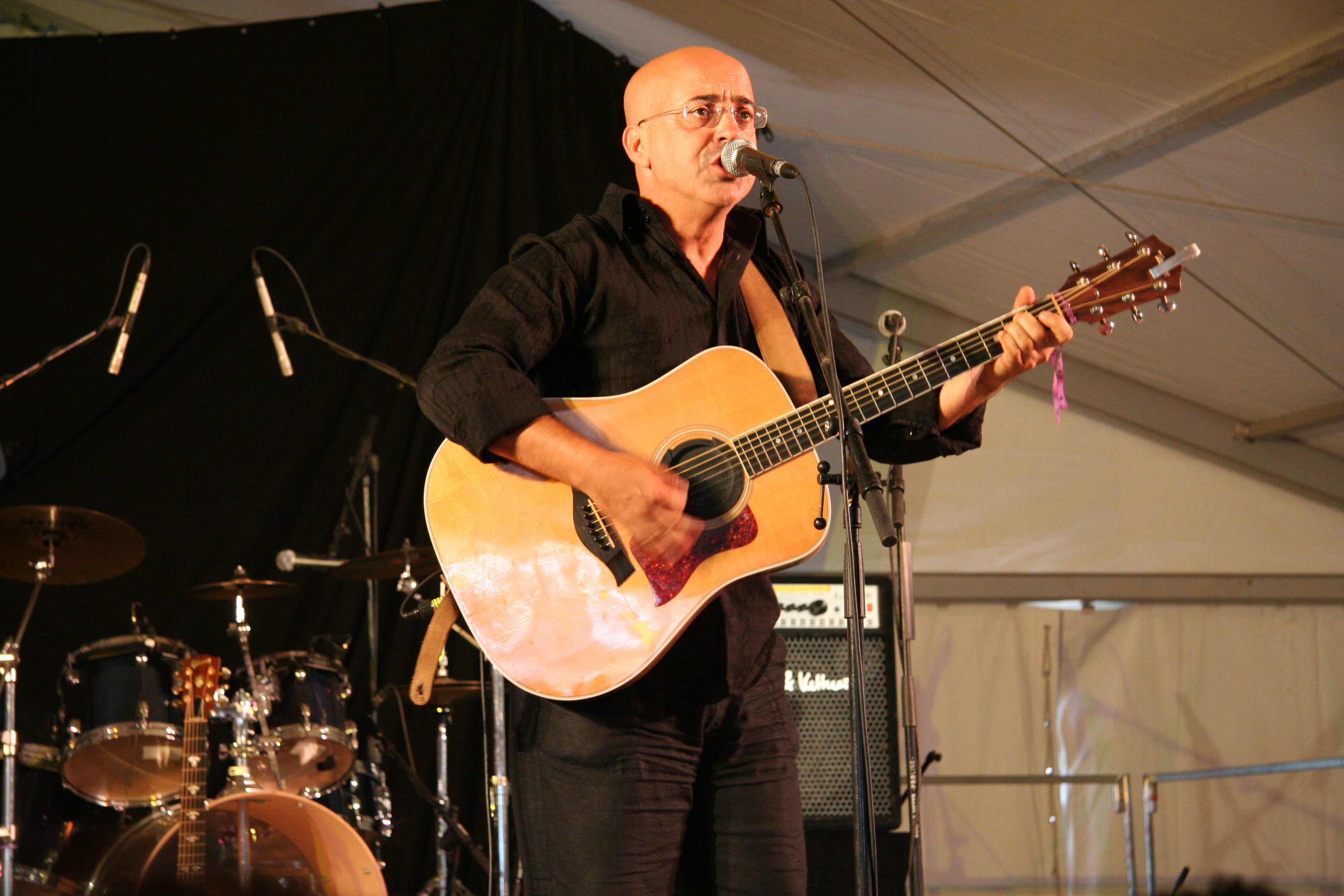 Jacques Veneruso virades de l'espoir 2007 Brue Auriac